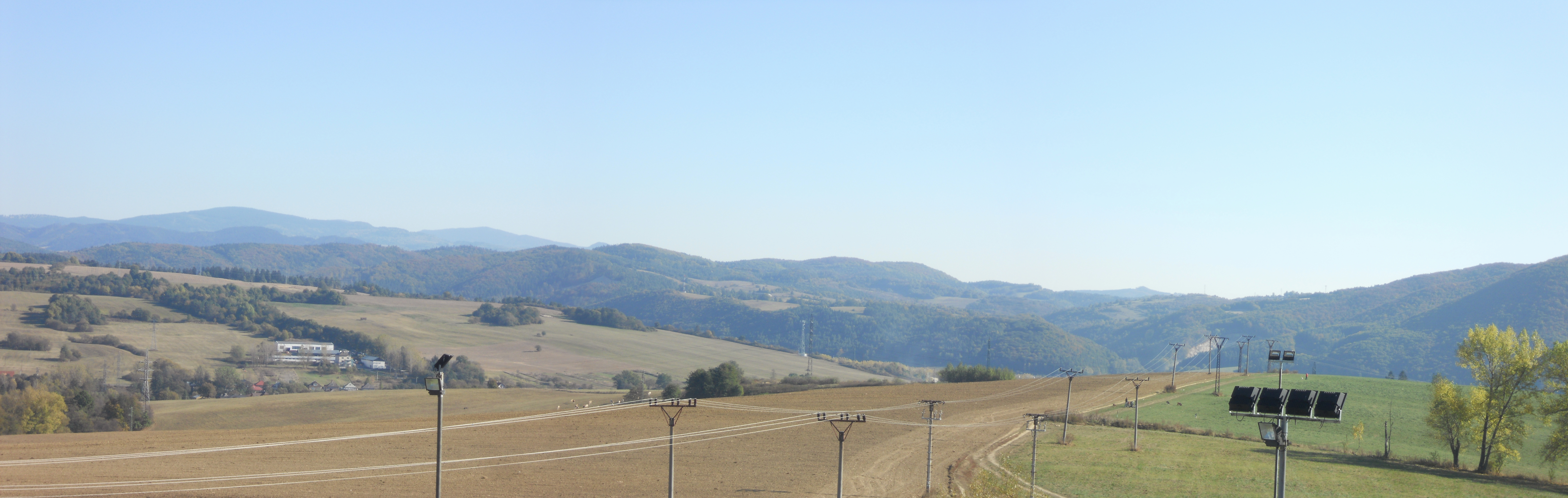 Distance